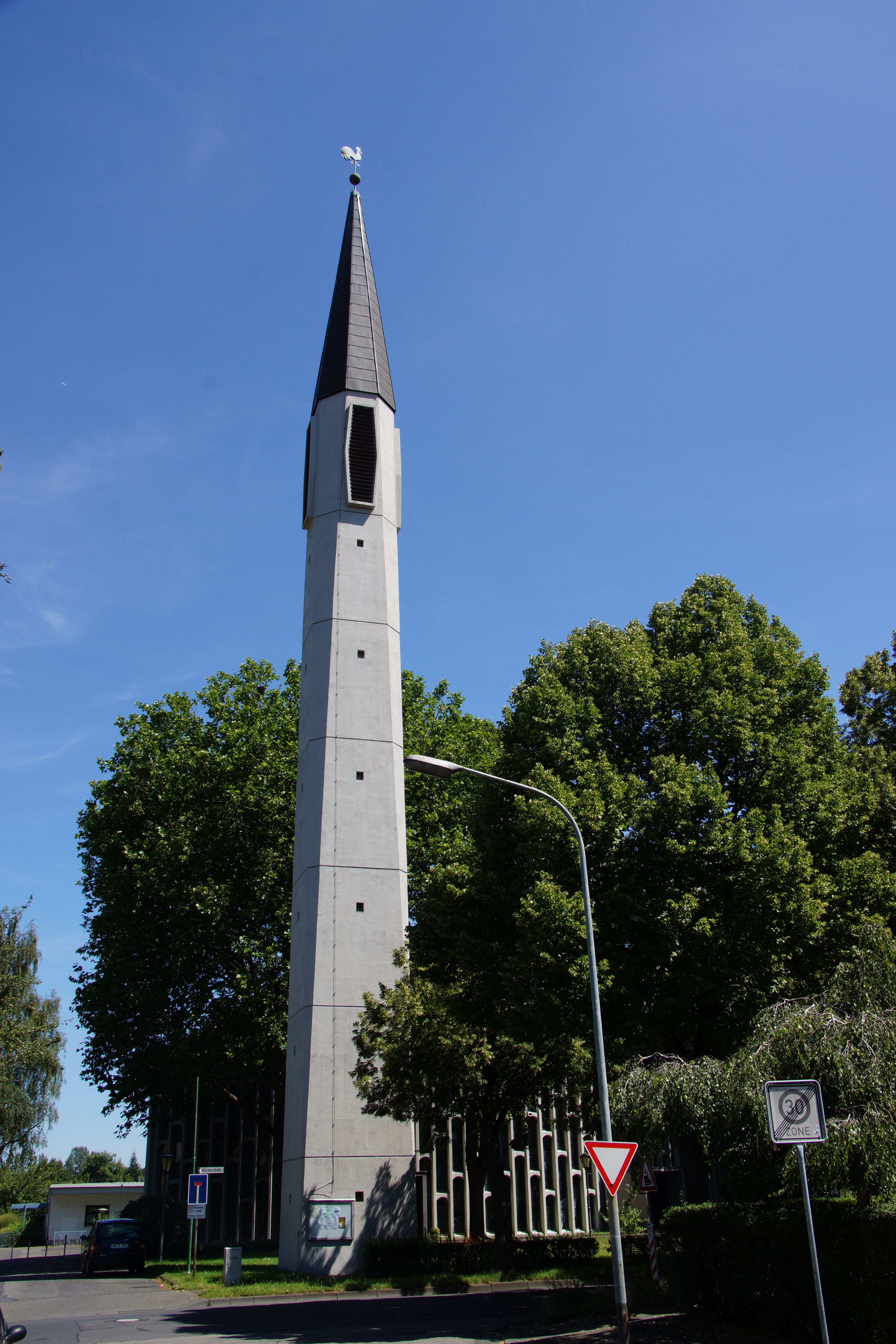 Heilig-Kreuz-Kirche mit Turm in Neuwied